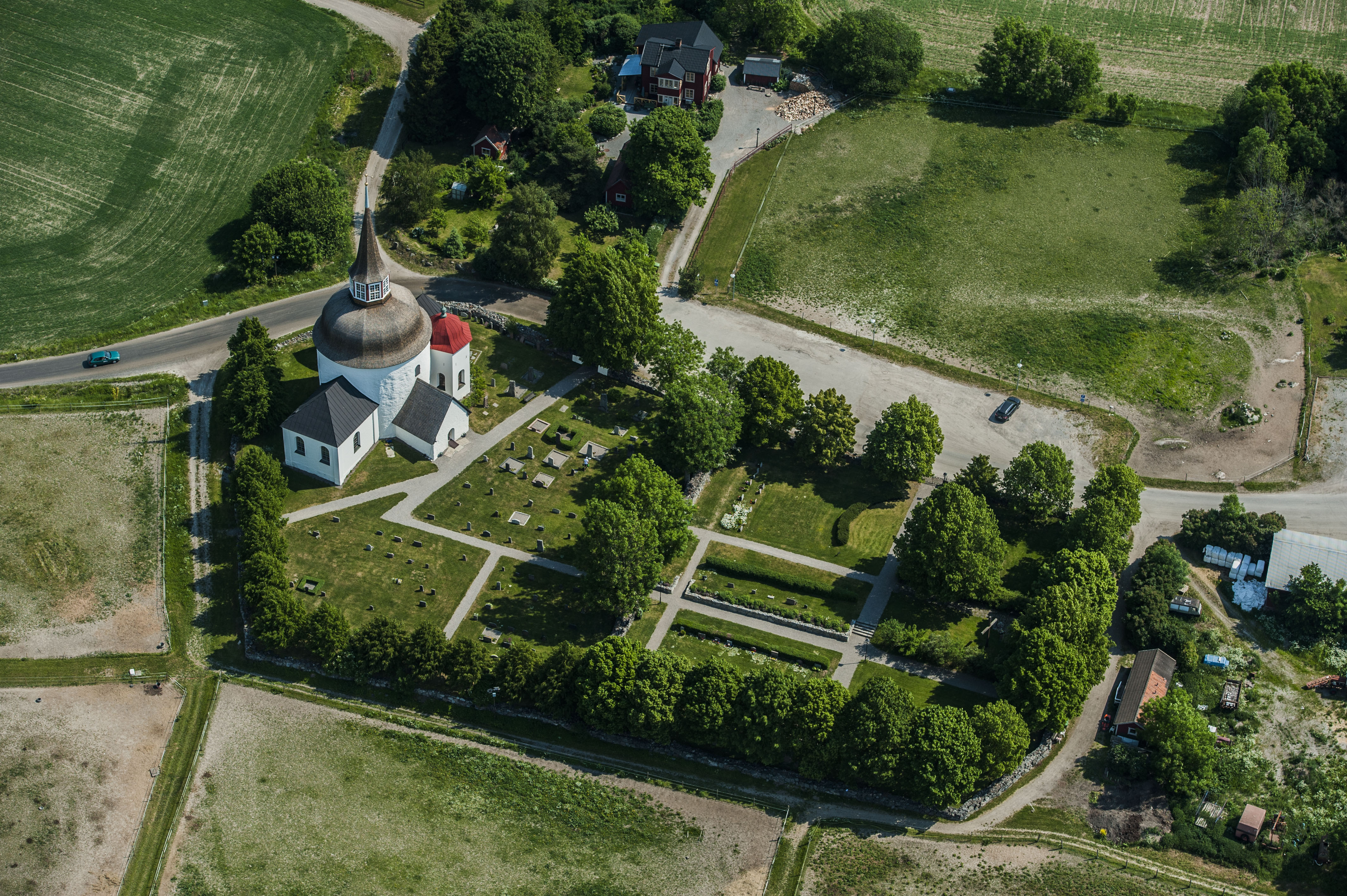 Munsö ka